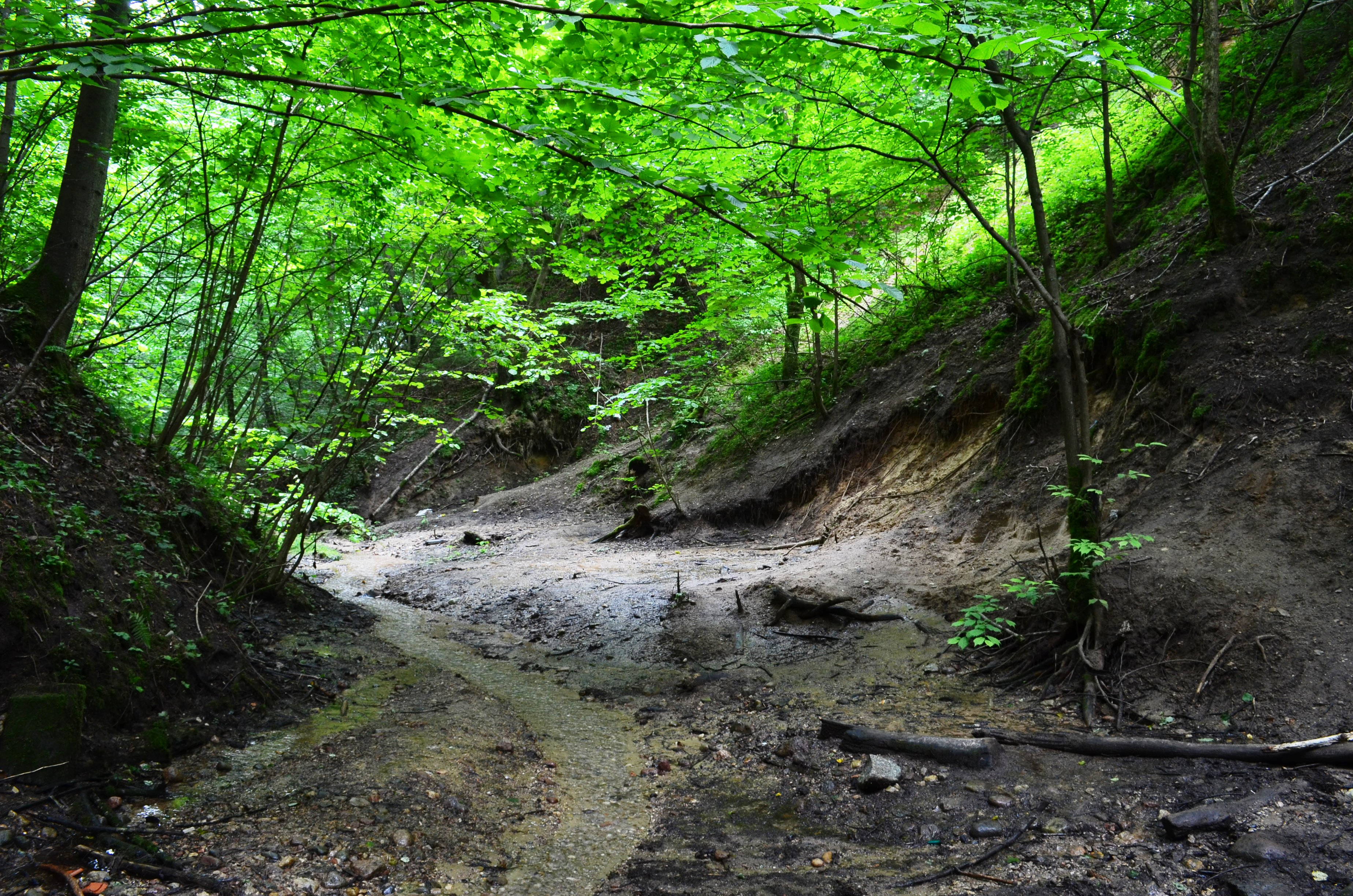 Verkių šaltinis, Verkių RP, Vilnius